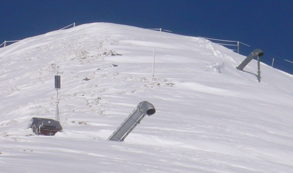 Un Gazex, depuis le haut de la piste "bleue du Monument", station de Les Contamines-Hauteluce Object location45° 47′ 51″ N, 6° 39′ 41.04″ E